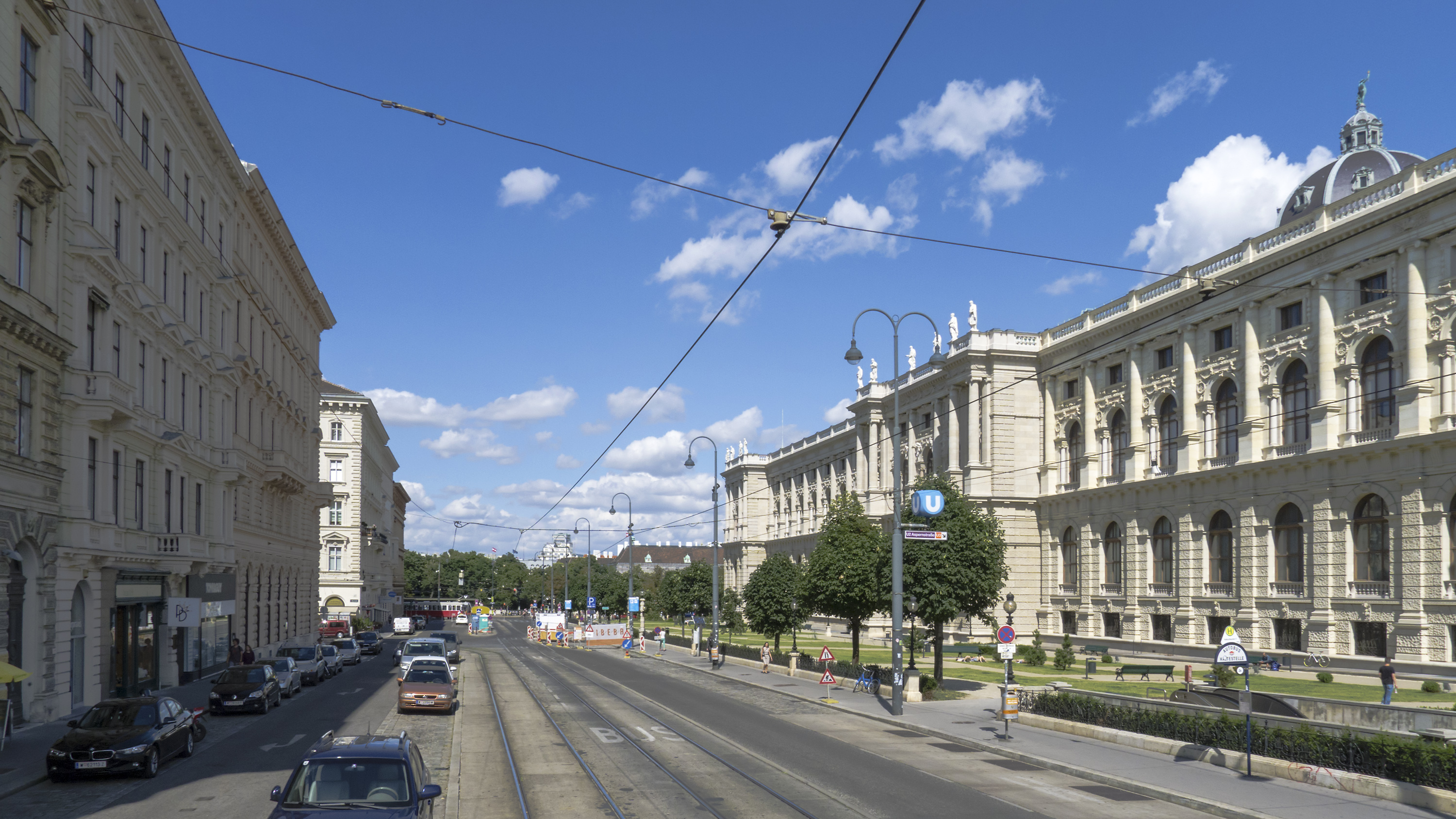 Bellariastraße in Wien 1 bei Nr. 10 Richtung Nordosten